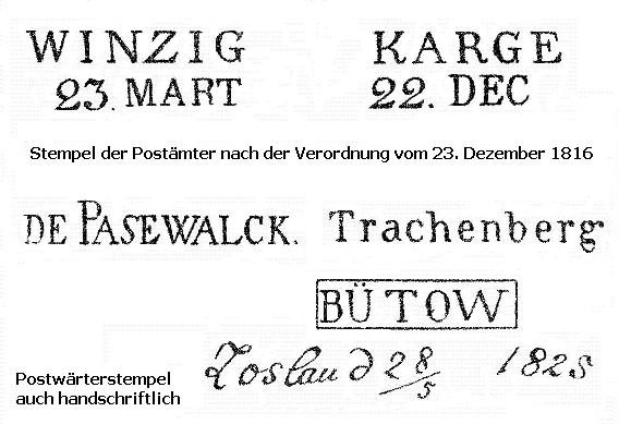 Amtliche Stempel der preußischen Post von 1816 aus Unterlagen der damaligen Zeit W.Steven 1816